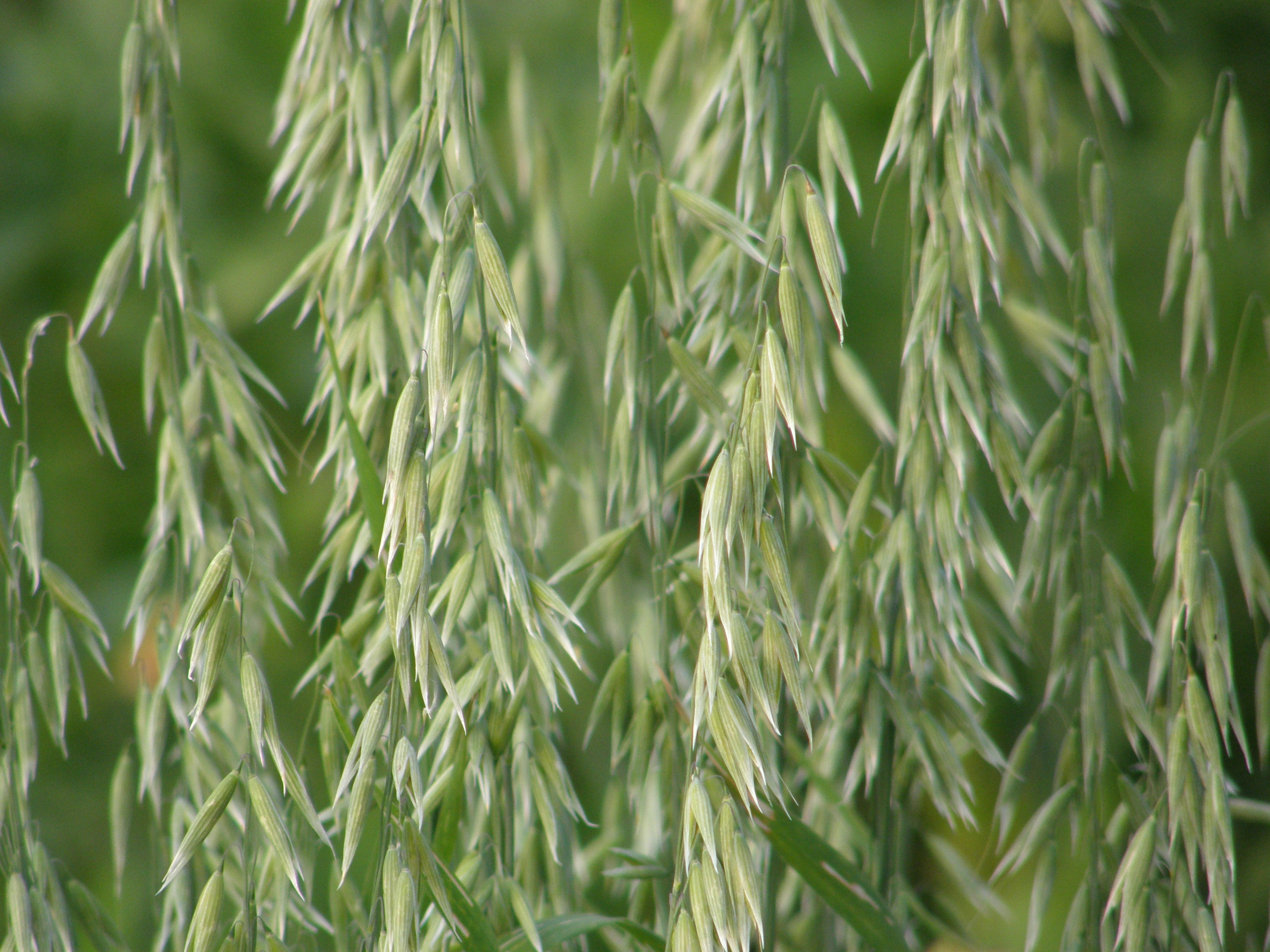 "Noire d'Epinal" : variété ancienne d'avoine.